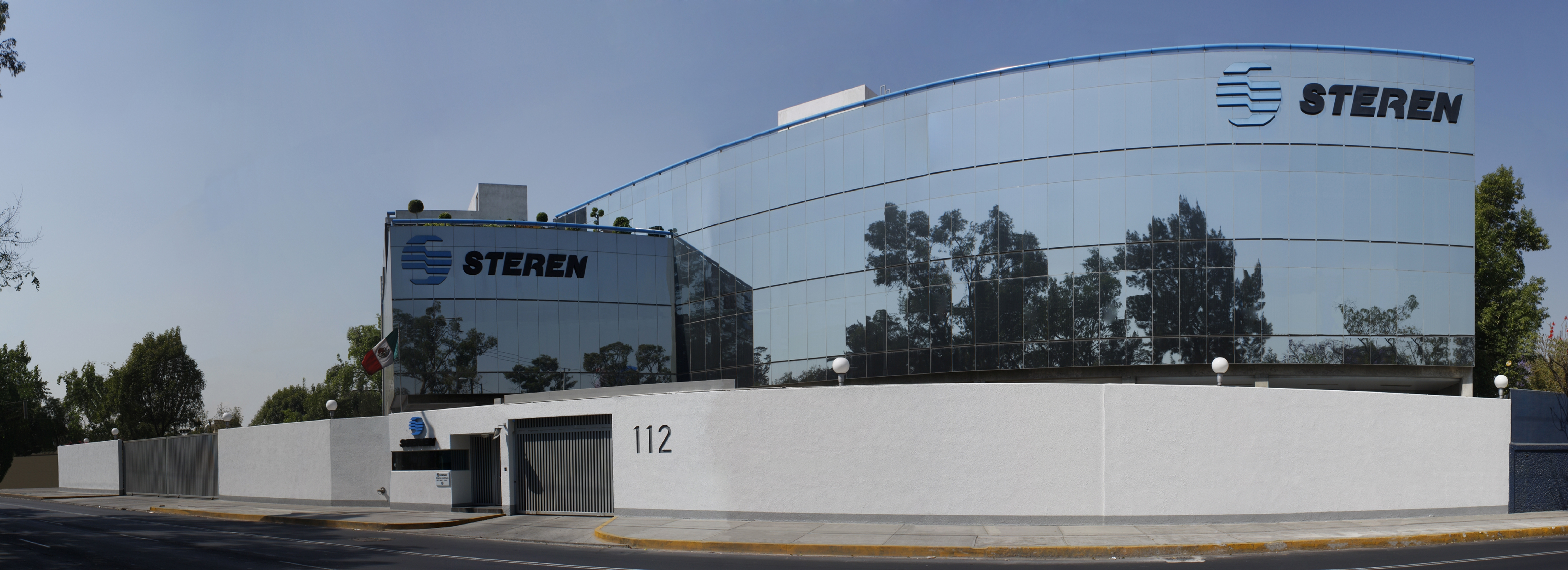 Oficinas Centrales de la Empresa Electrónica Steren en la Ciudad de México Camera: Canon EOS 40D License on Flickr (2012-01-04): CC-BY-SA-2.0